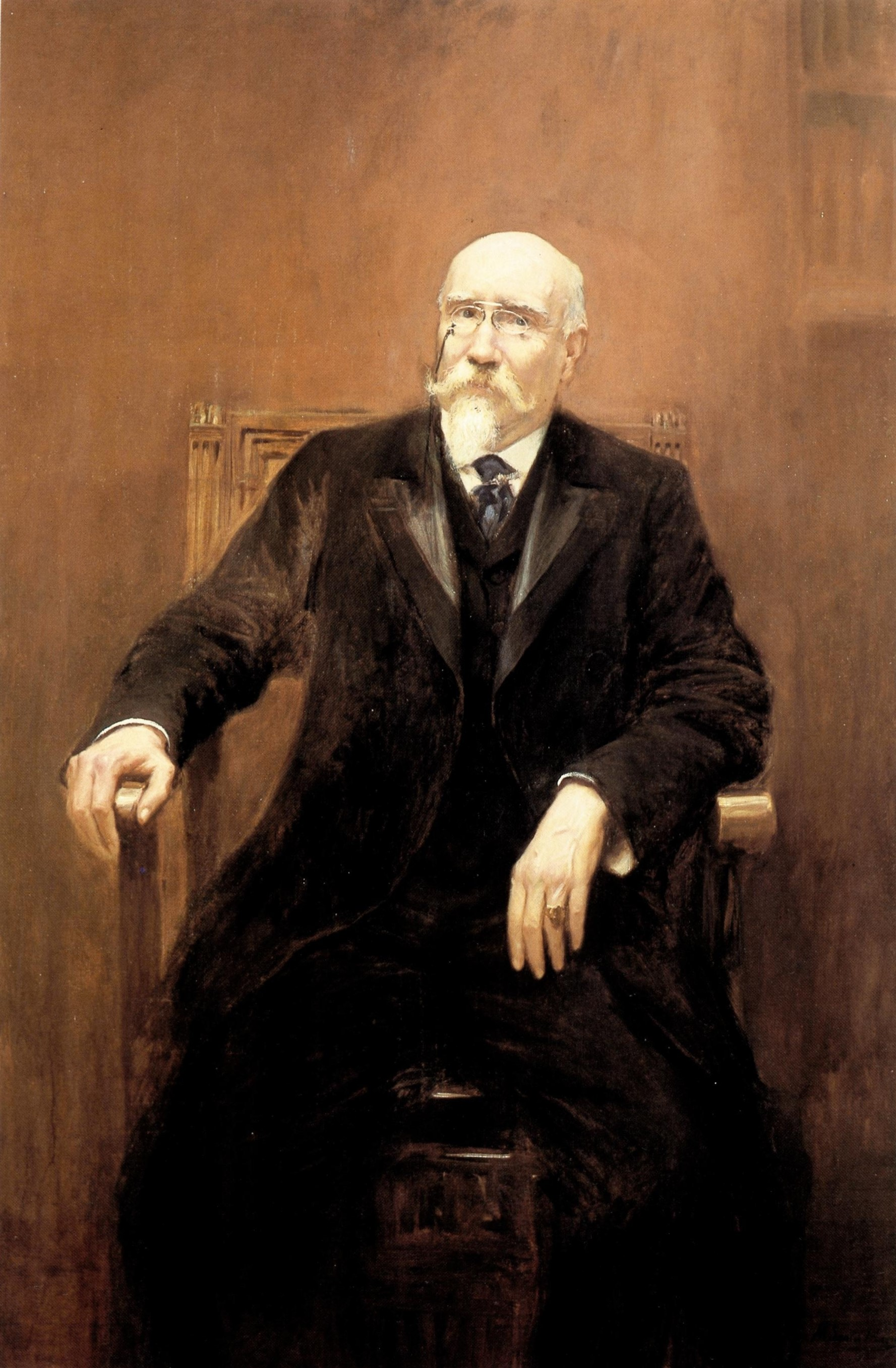 José Echegaray